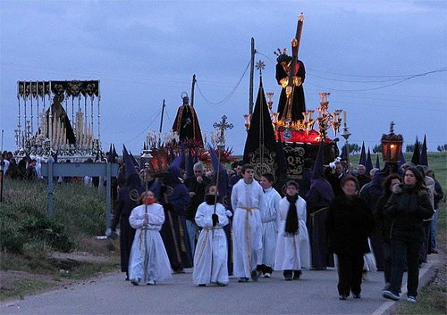 procesison de la madruga en belalcazar